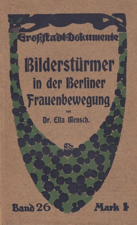 Ella Mensch: Bilderstürmer in der Berliner Frauenbewegung. Berlin: Hermann Seemann Nachfolger, 4. Auflage, 1906 Großstadt-Dokumente Band 26, hrsg. von Hans Ostwald